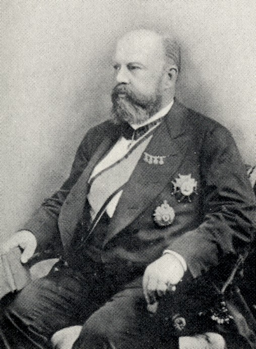 Brännvinskungen Lars Ohlsson Smith